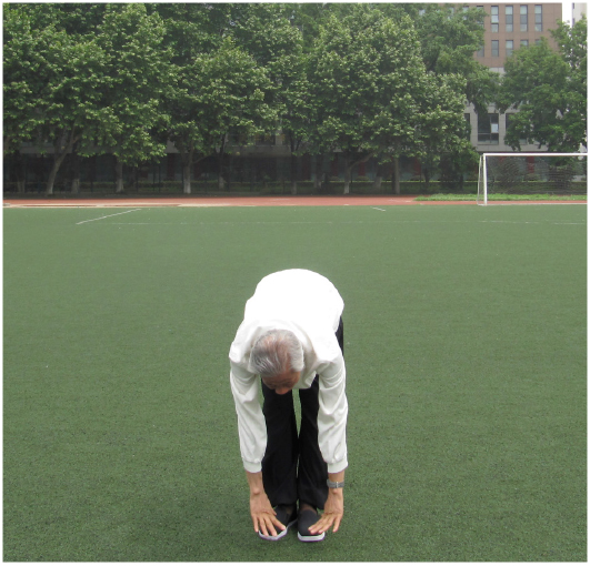 Abschnitt 6: Tief beugen, um die Nieren und den Hüftbereich zu stärken